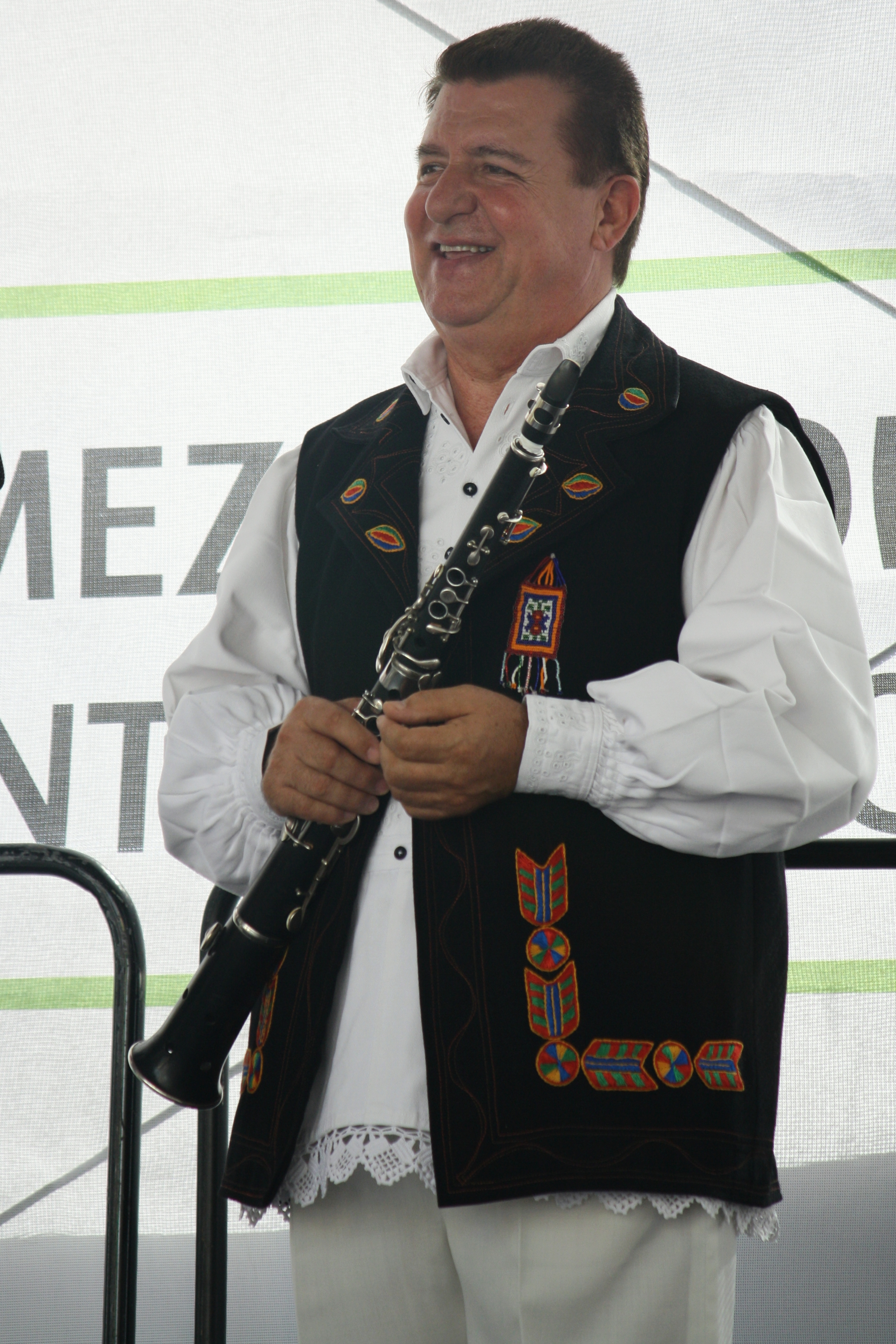 7. mezinárodní folklórní festival Pražský jarmark - Dãntãuşii din Groşi (Rumunsko); Dumitru Dobrican, hráč na tárogató. This photograph was taken with a DSLR from WMCZ's Camera grant.